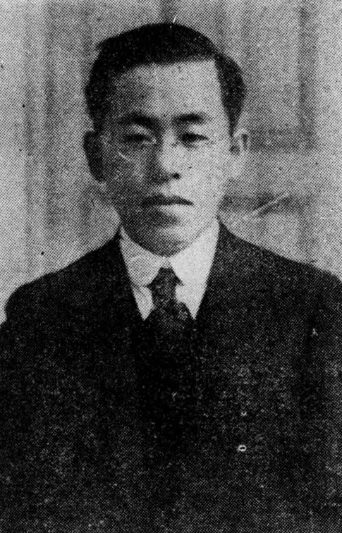 宮地直一（1886-1949）